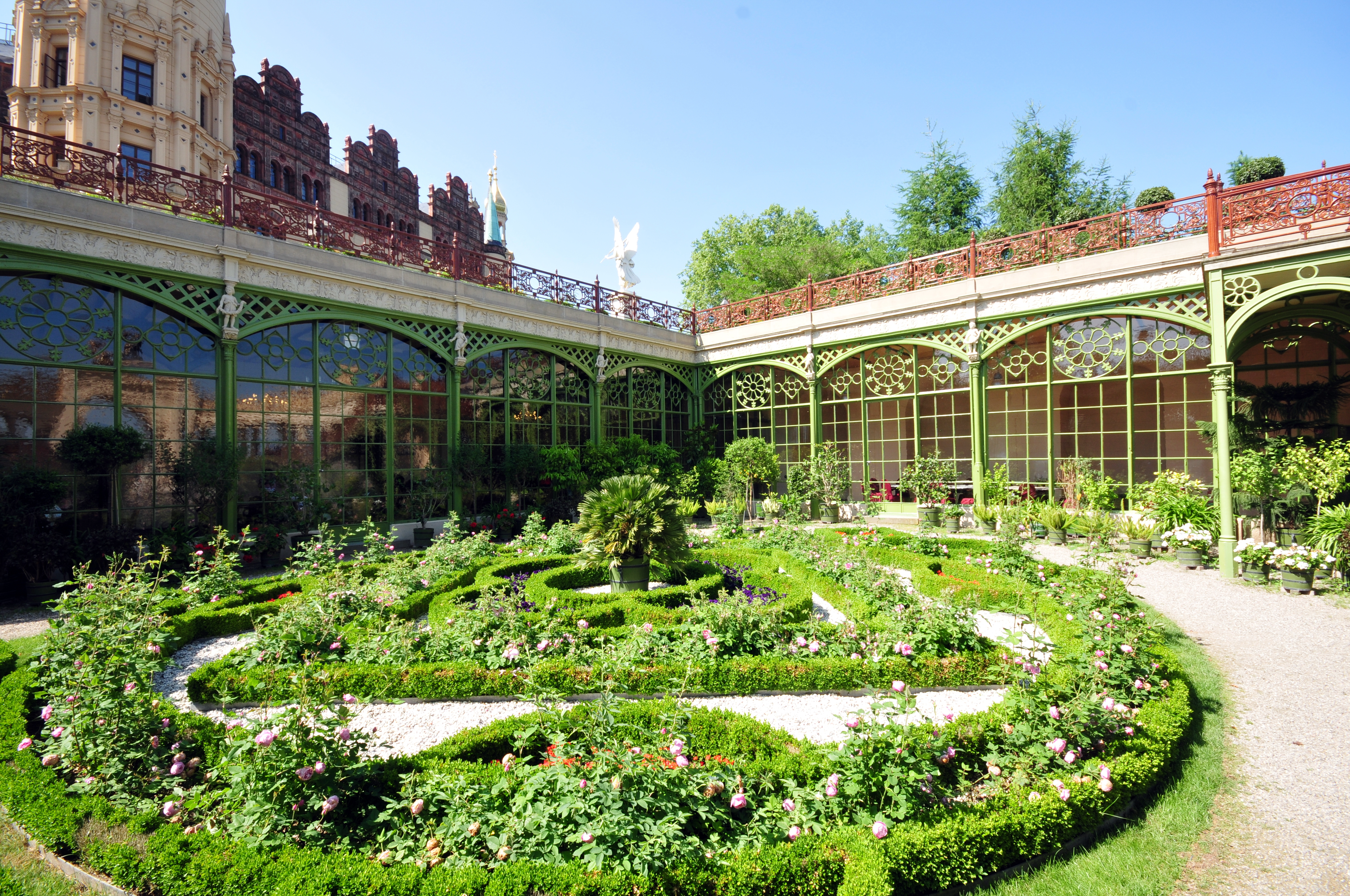 Schweriner Schloß; Orangerie und Schloßgarten